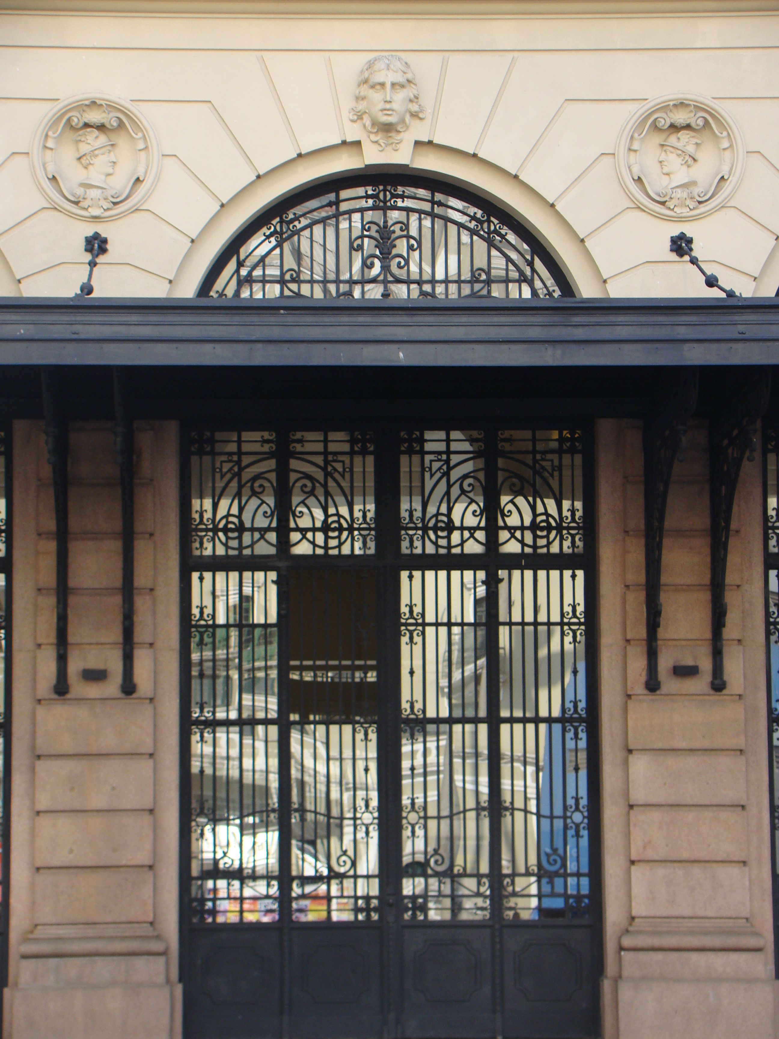 Porta da entrada principal do Palácio dos Correios, em São Paulo (SP), Brasil.